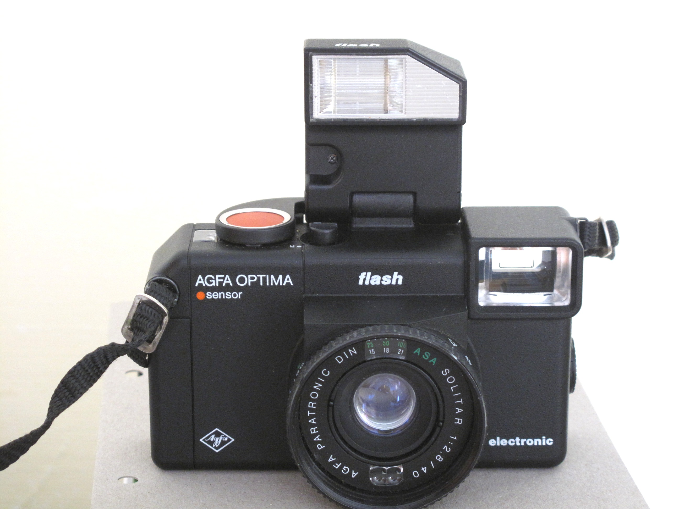 Agfa Optima Flash